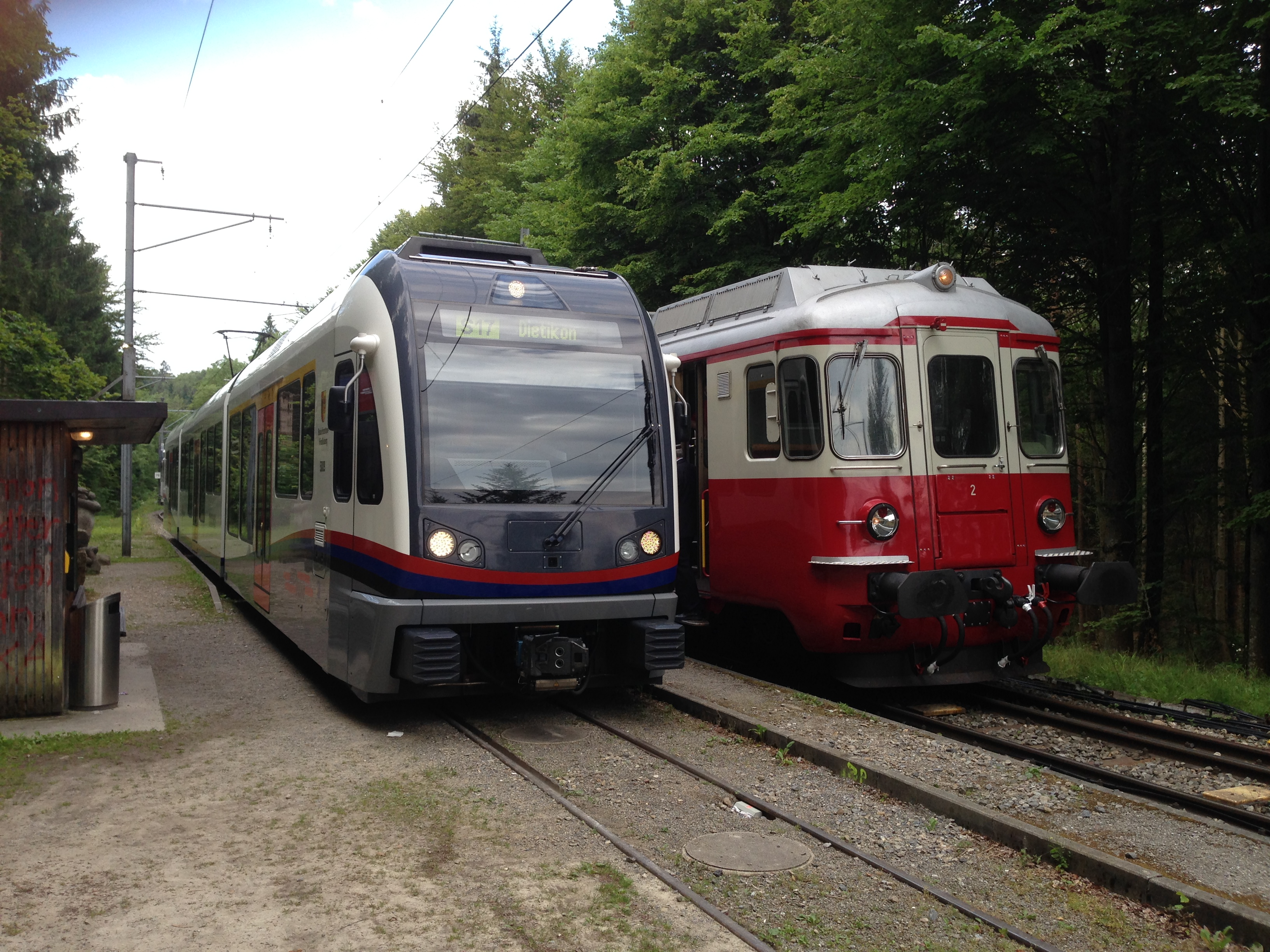 DSF ex. WM BDe 4/4 2, geschoben durch DSF Em 3/3, wird durch Diamant der BDWM AG in Erdmannlistein überholt. Zweitletzter Betriebstag des Dreischienengleises zwischen Wohlen und Bremgarten West.